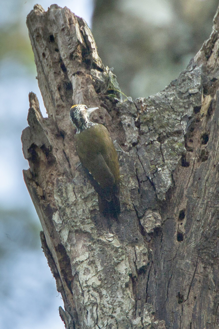 Golden-crowned Woodpecker - Kakamega Kenya 06_2536